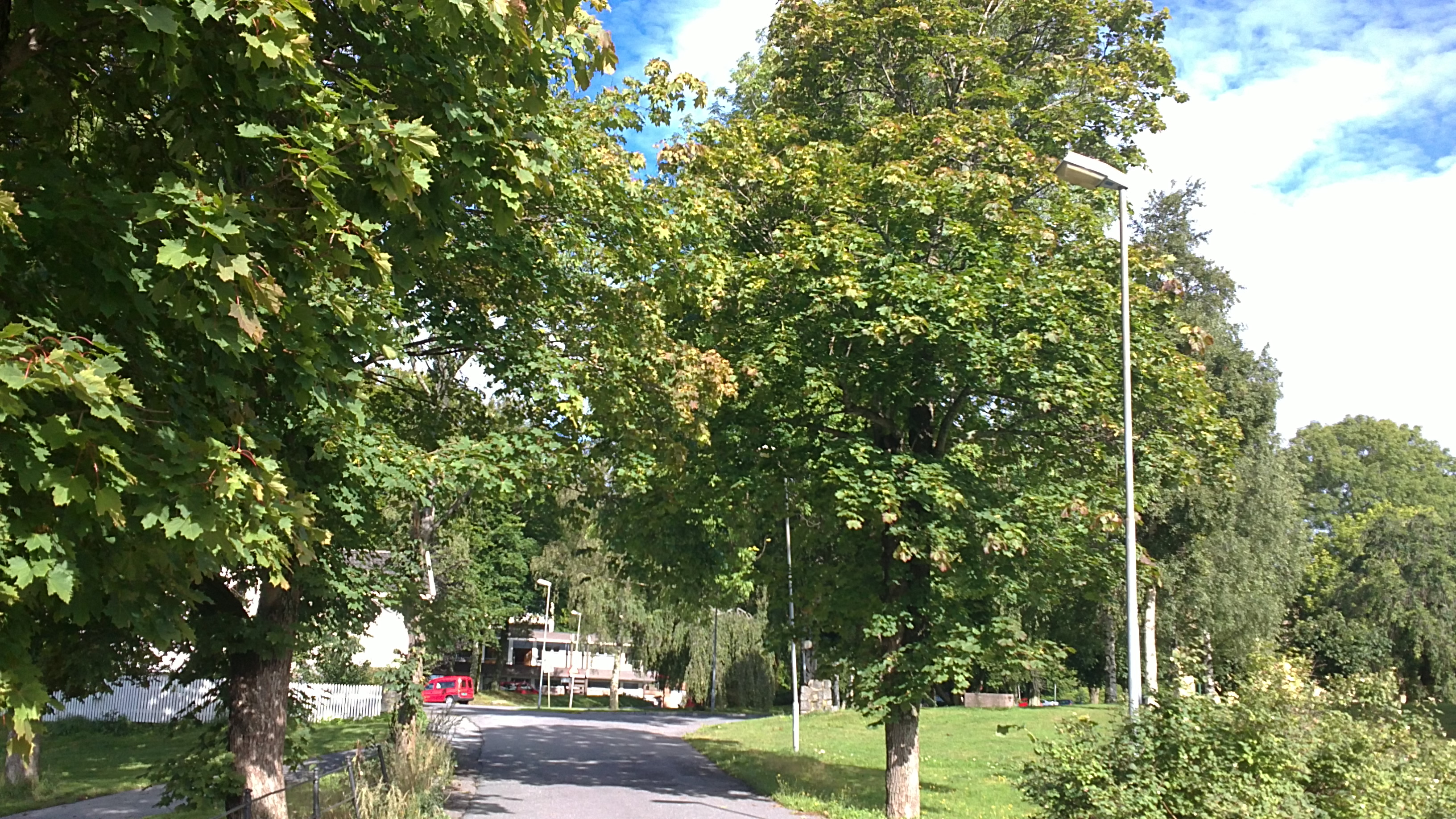 Bilde av Badeparken